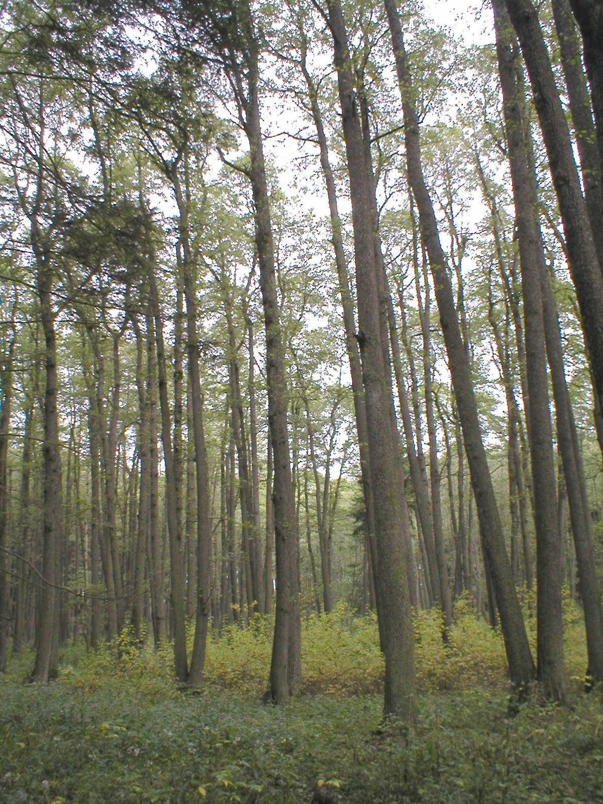 Olšiny v PR Jechovec